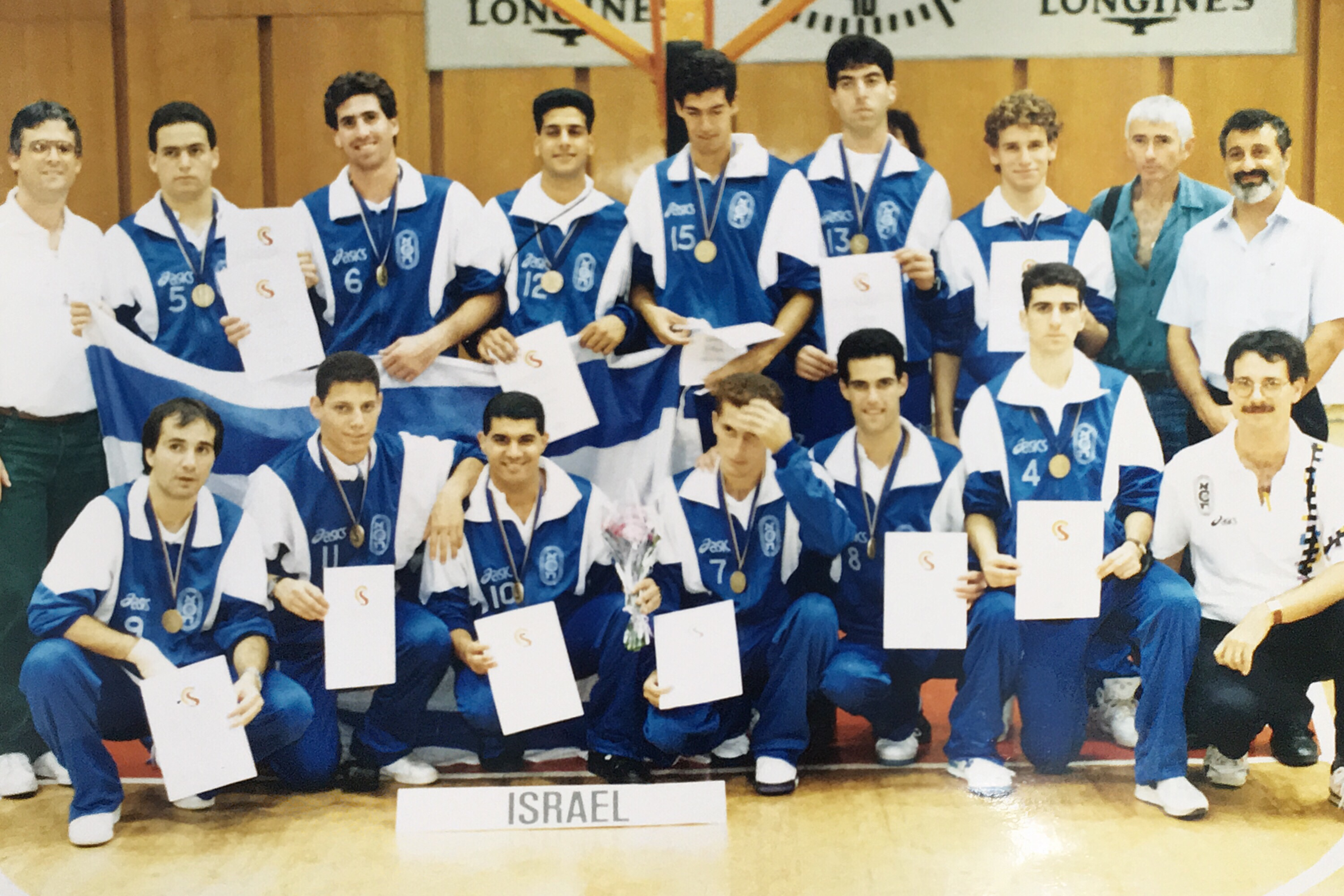 מדלית ארד ישראל בכדורסל באוליפיאדת החרשים 1993 בבולגריה לאחר נצחון על גרמניה 36:37.